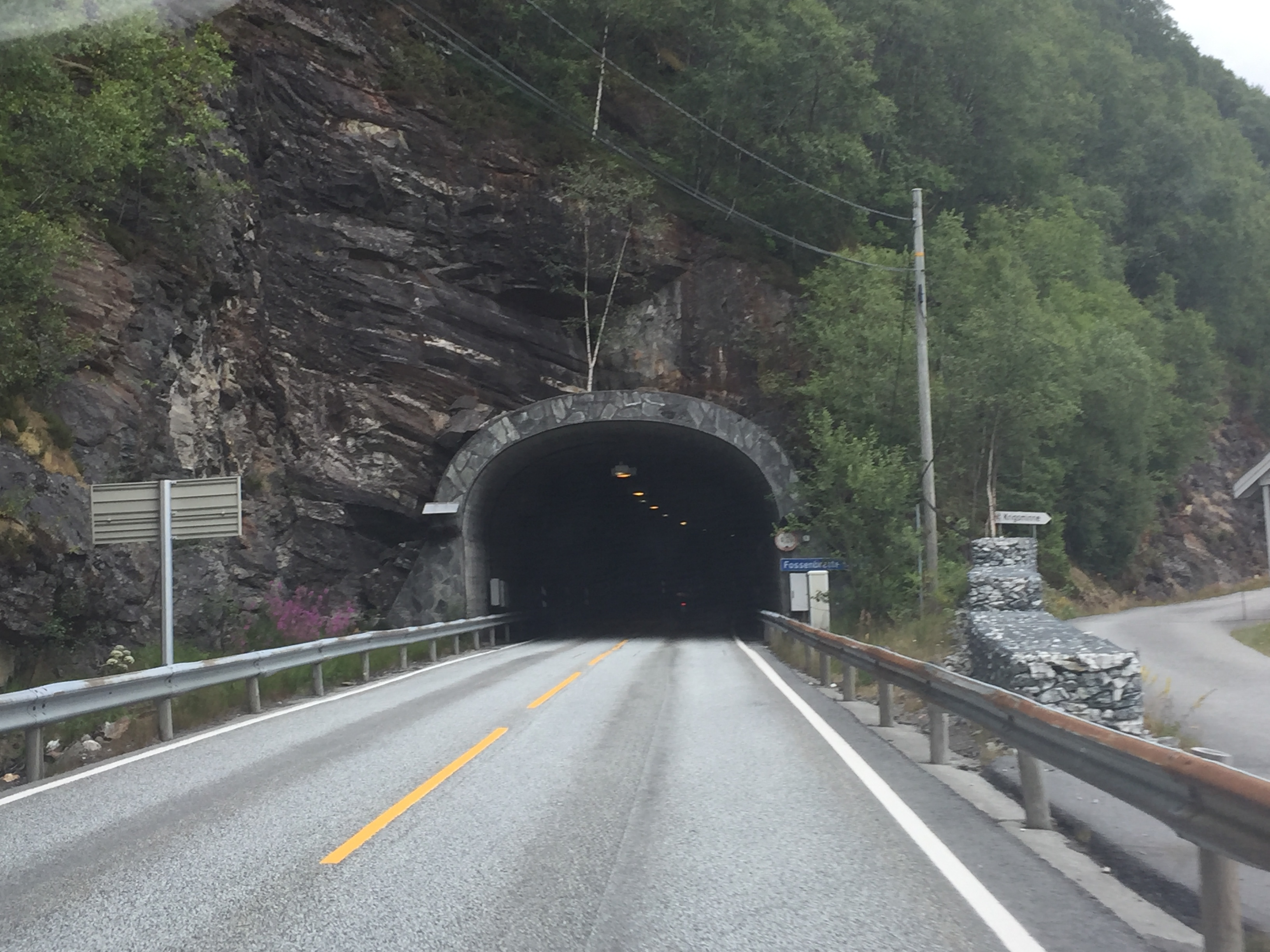 Fossenbrattetunnelen